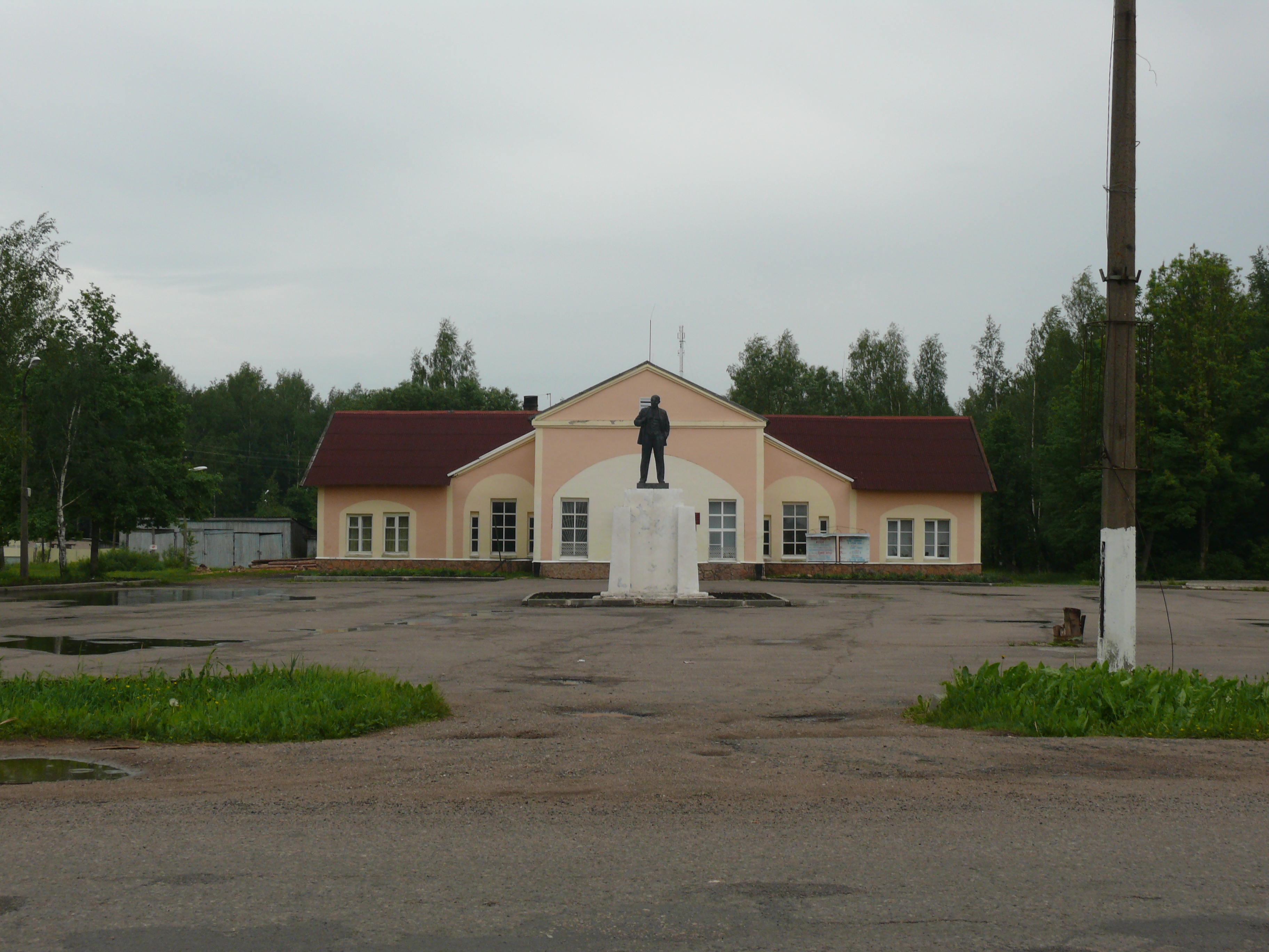 Поддорье, Новгородская область